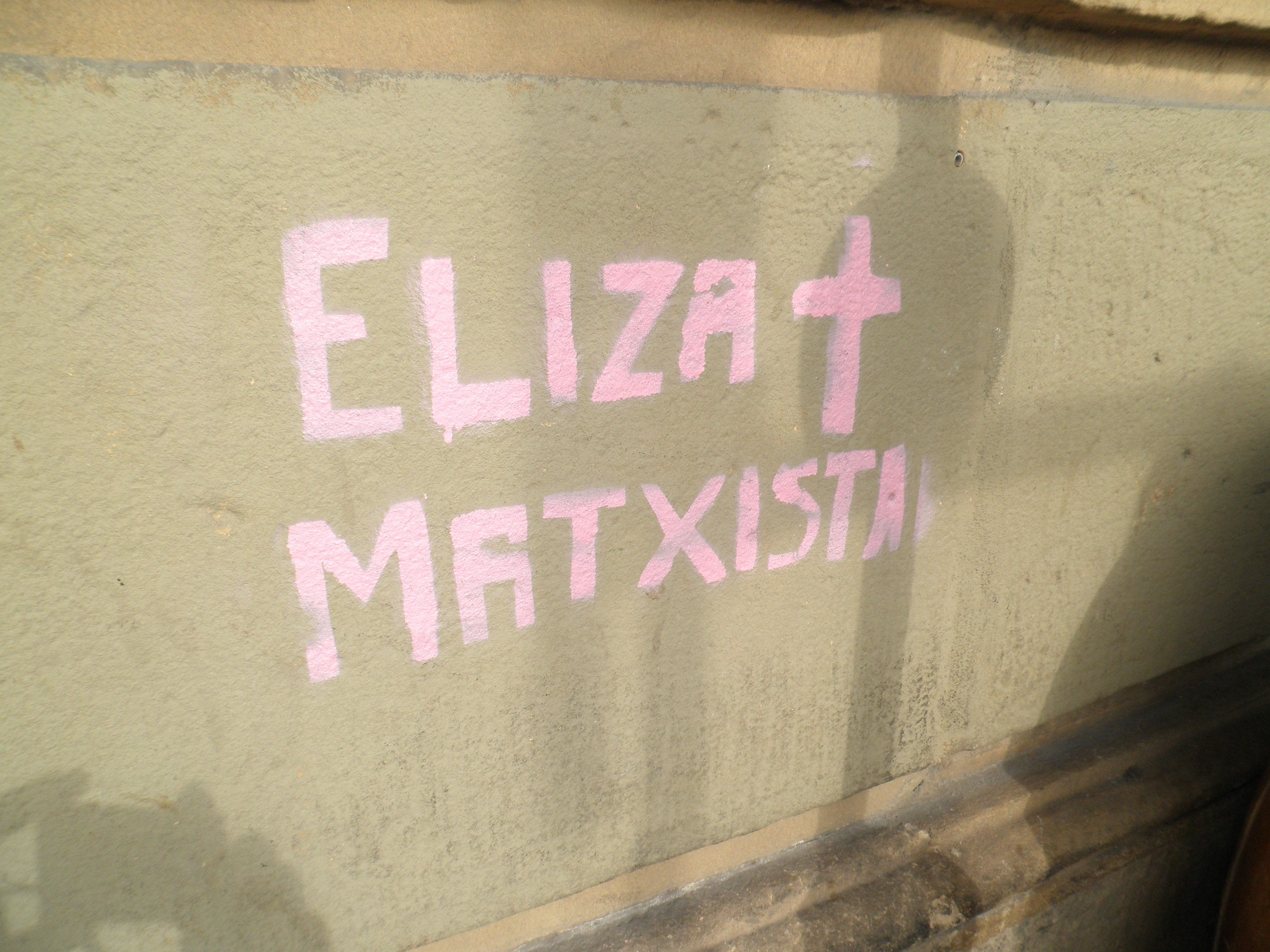 Eliza matxista, Donostiako Gros auzoan egindako pintada.